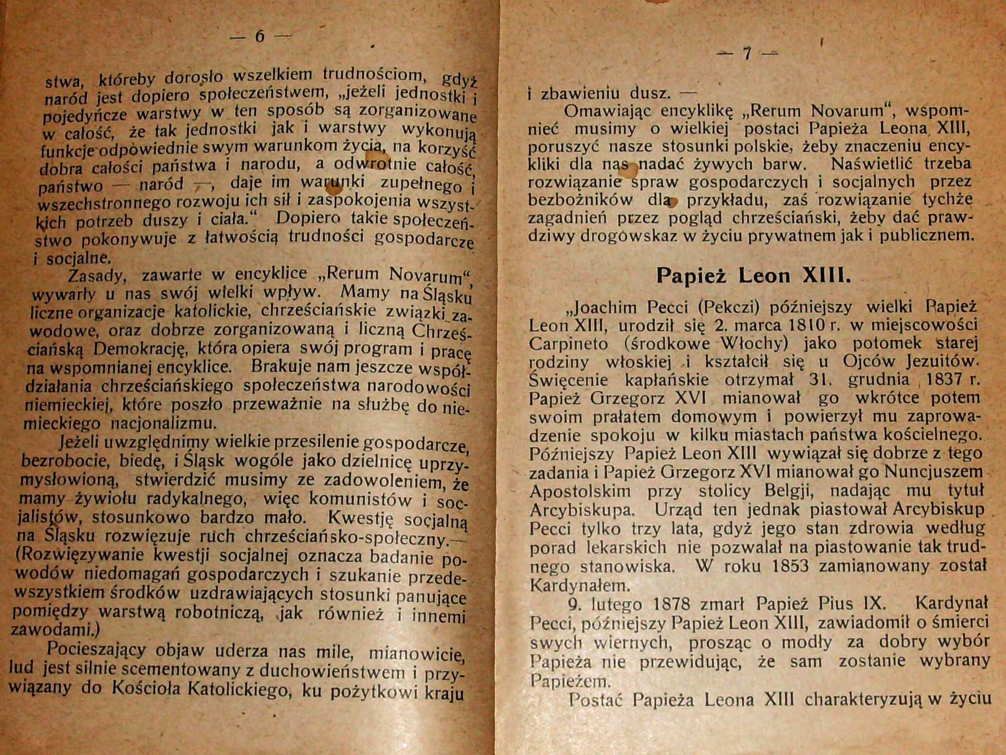 Stanisław Krzyżowski, Rozmyślania w czterdziestą rocznicę encykliki „Rerum novarum”, wydanej 15 maja 1891 r. przez papieża Leona XIII, Pszczyna 1931